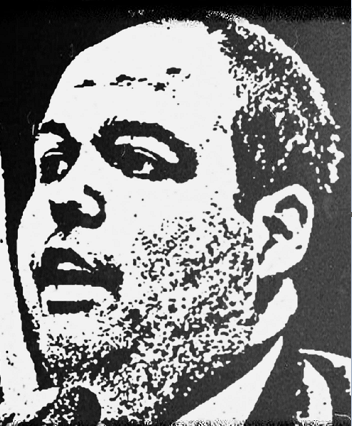 presidente nacional da juventude democratas